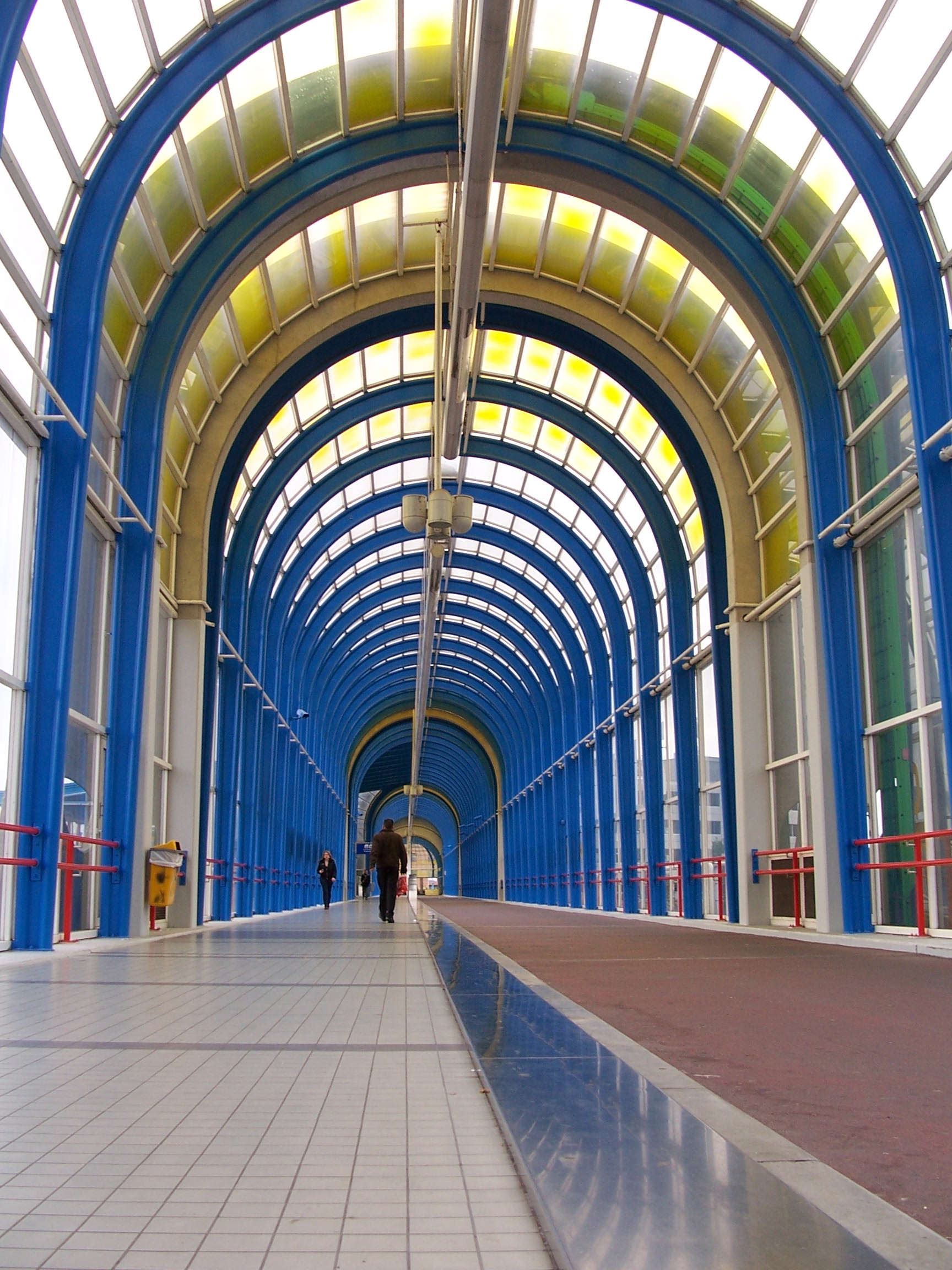 De Mandelabrug over station Zoetermeer, de A12 en station Driemanspolder